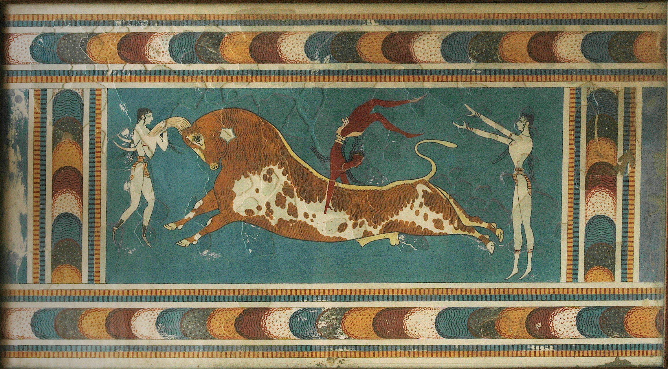 Knossos, fresque au taureau.